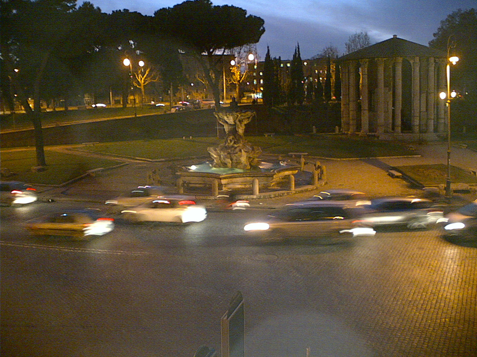 Tempio di Ercole a Roma, ItaliaImage122